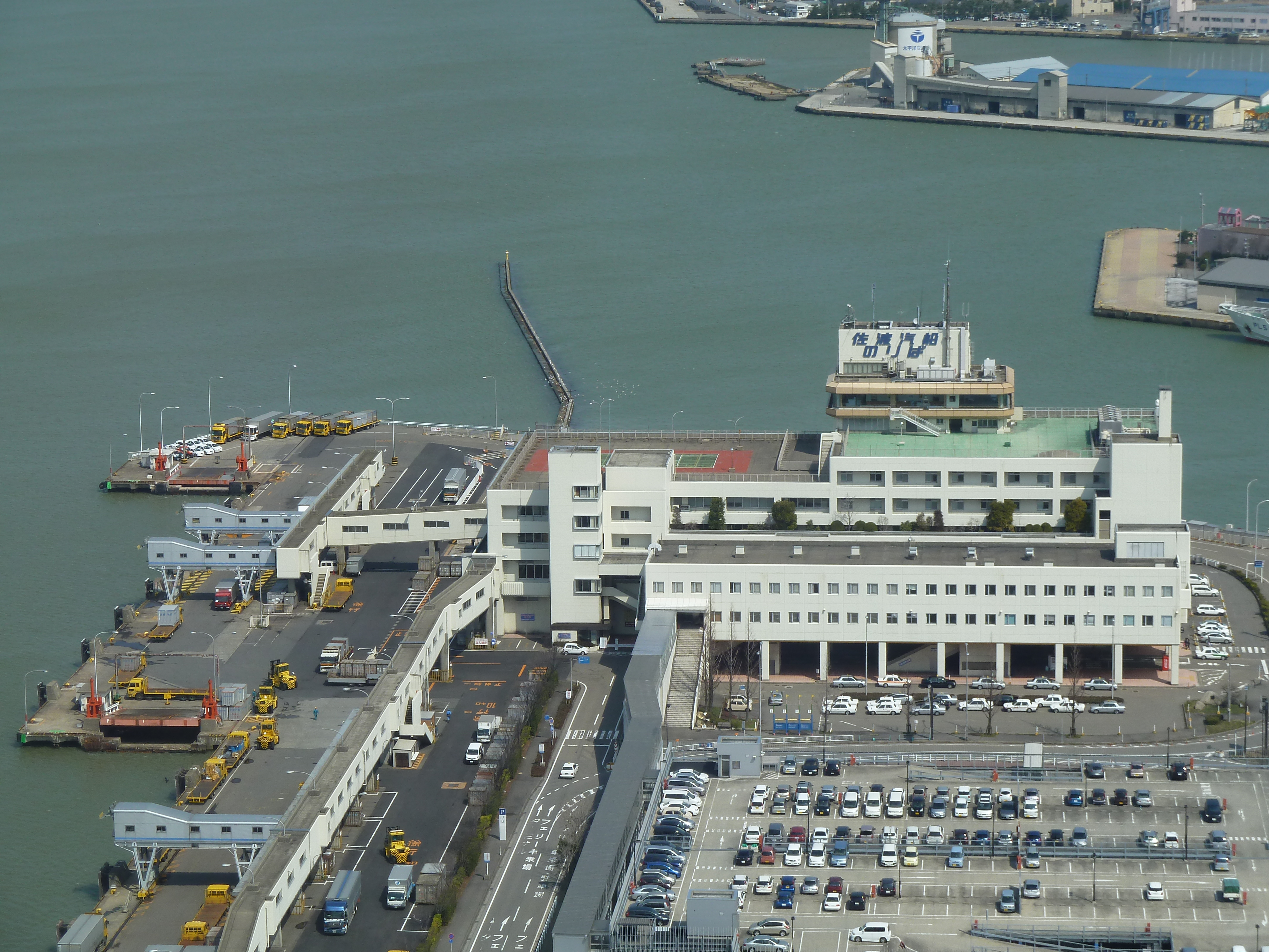 佐渡汽船ターミナル